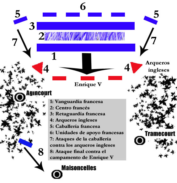 Pequeño mapa táctico de la Batalla de Agincourt. El mismo es de autoría propia (usuario: Eamezaga).